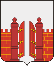 Герб городского поселения Верея